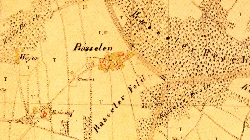 Kartenaufnahme der Rheinlande durch Tranchot und von Müffling, Blatt 42 (Viersen), Ausschnitt mit dem Gebiet des Dorfes Rasseln.